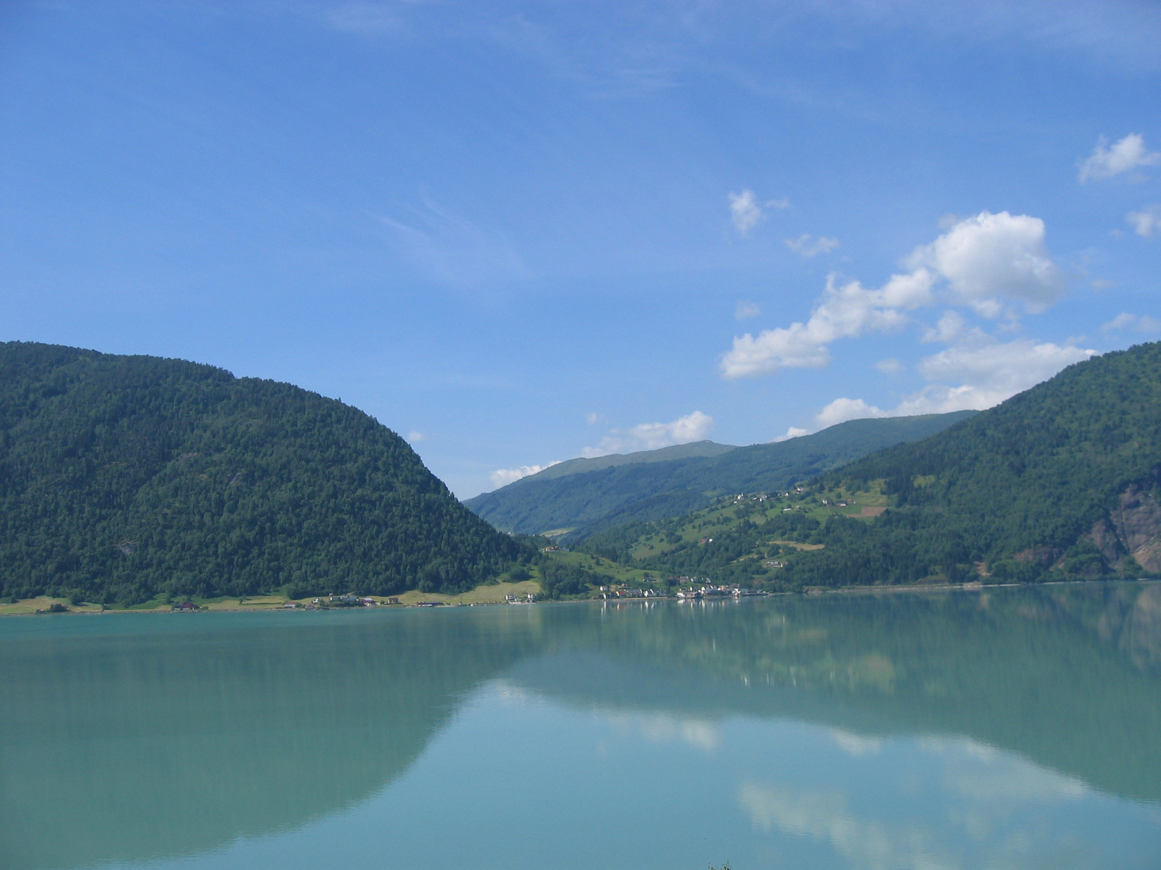 Marifjøra ved Lustrafjorden